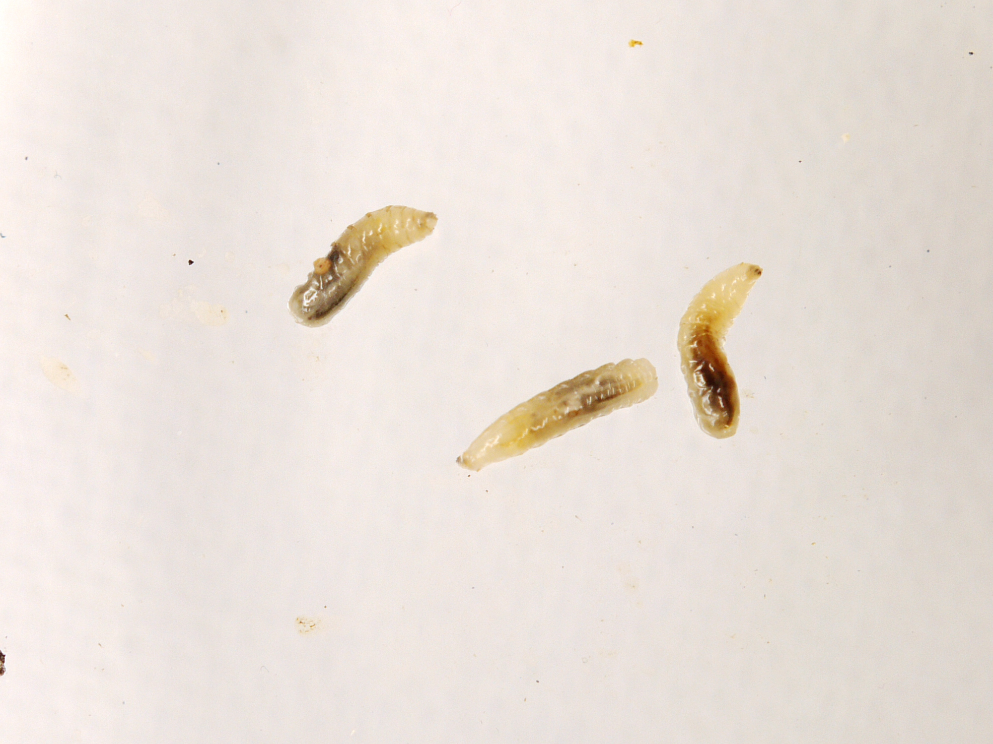 Larven der Walnussfruchtfliege Rhagoletis completa".